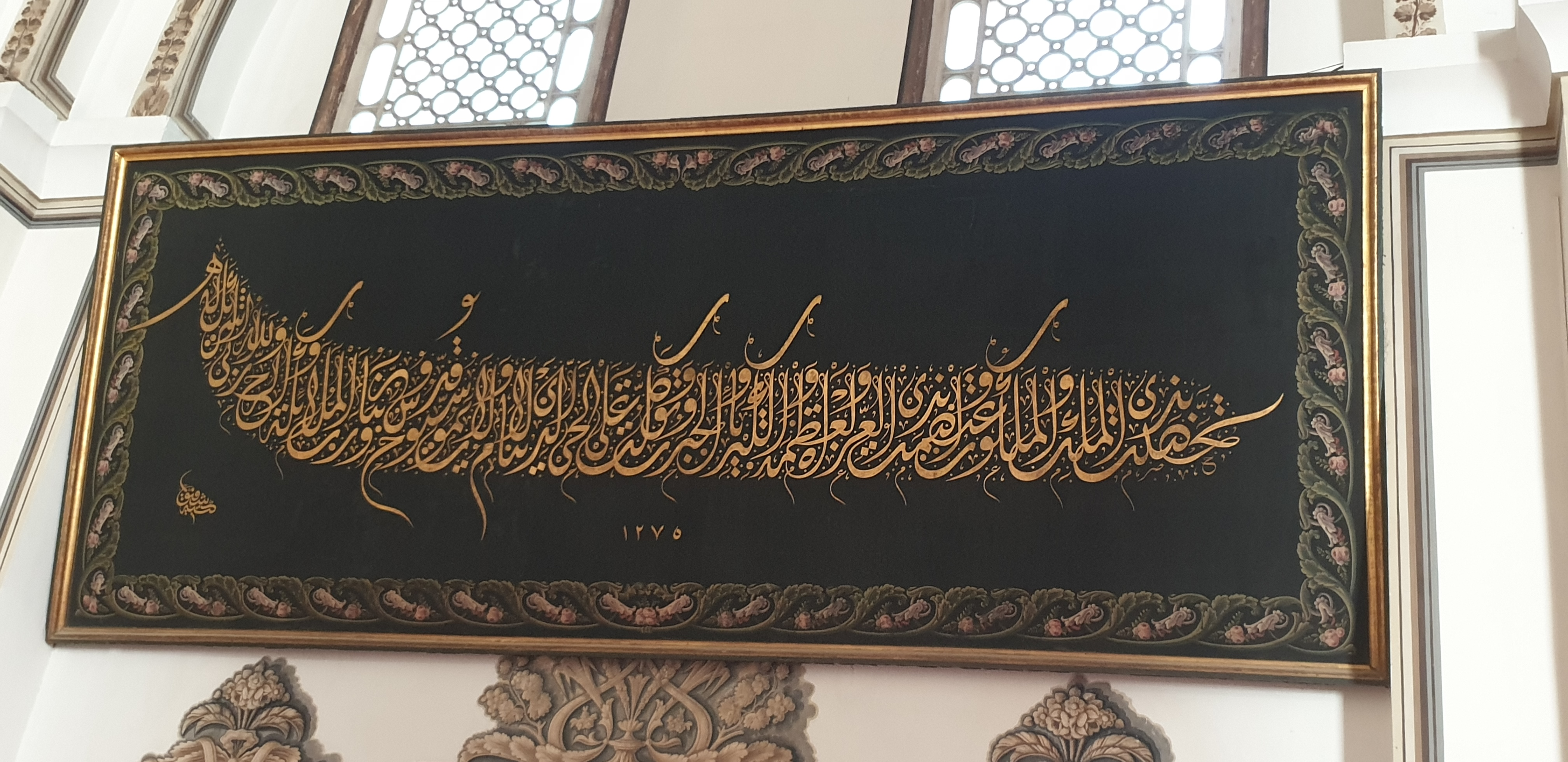 Bursa Ulucami'deki meşhur hat örneklerinden biri